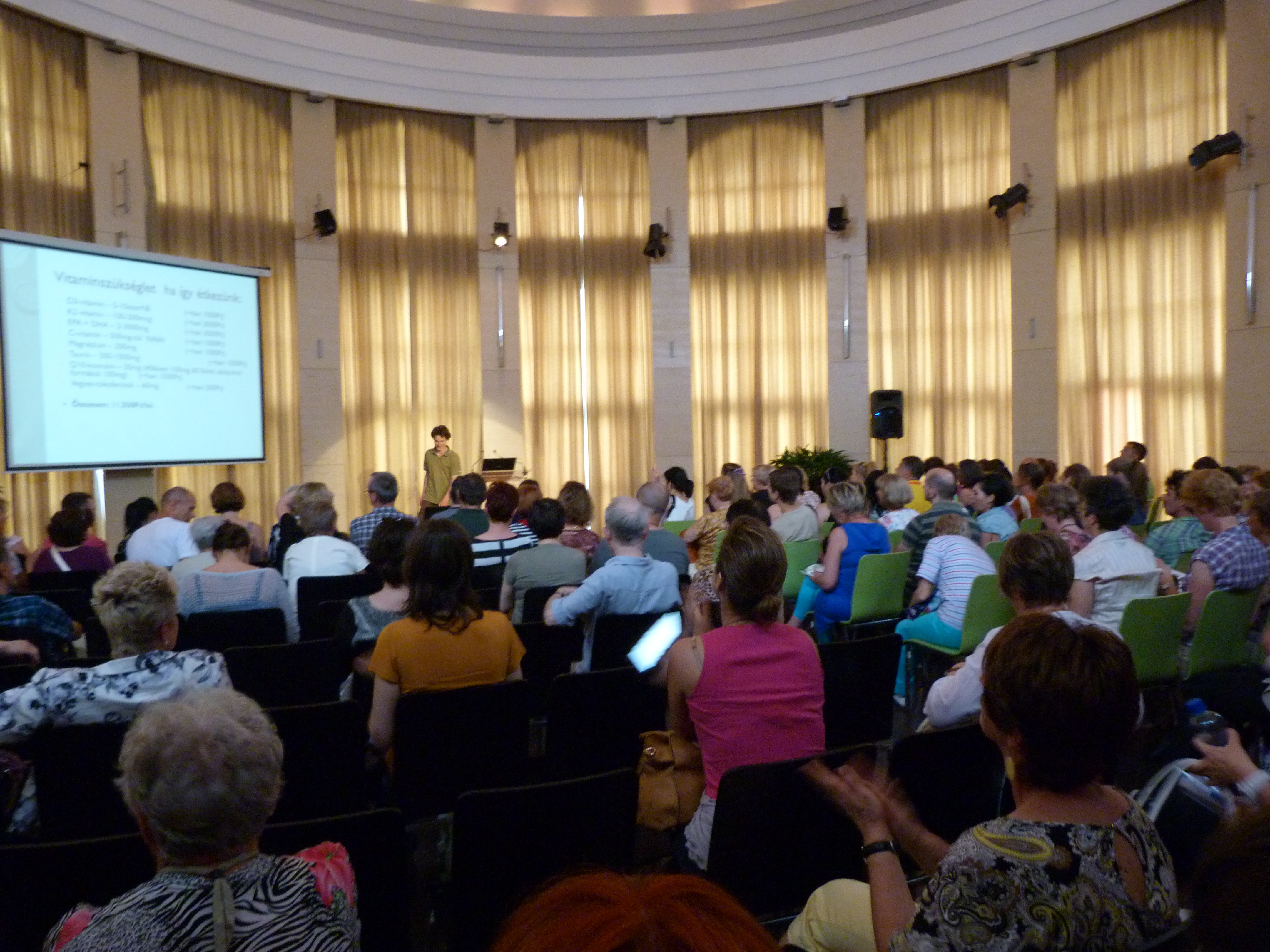 Paleország Fesztivál, MOM Kulturális Központ (1124 Budapest, Csörsz utca 18 szám). Szendi Gábor: A paleo aktuális kérdései, Gál Bence: Vitaminok. Kocsis Richard: A dinoszauruszok kihalása. Forrás: paleorszag.hu